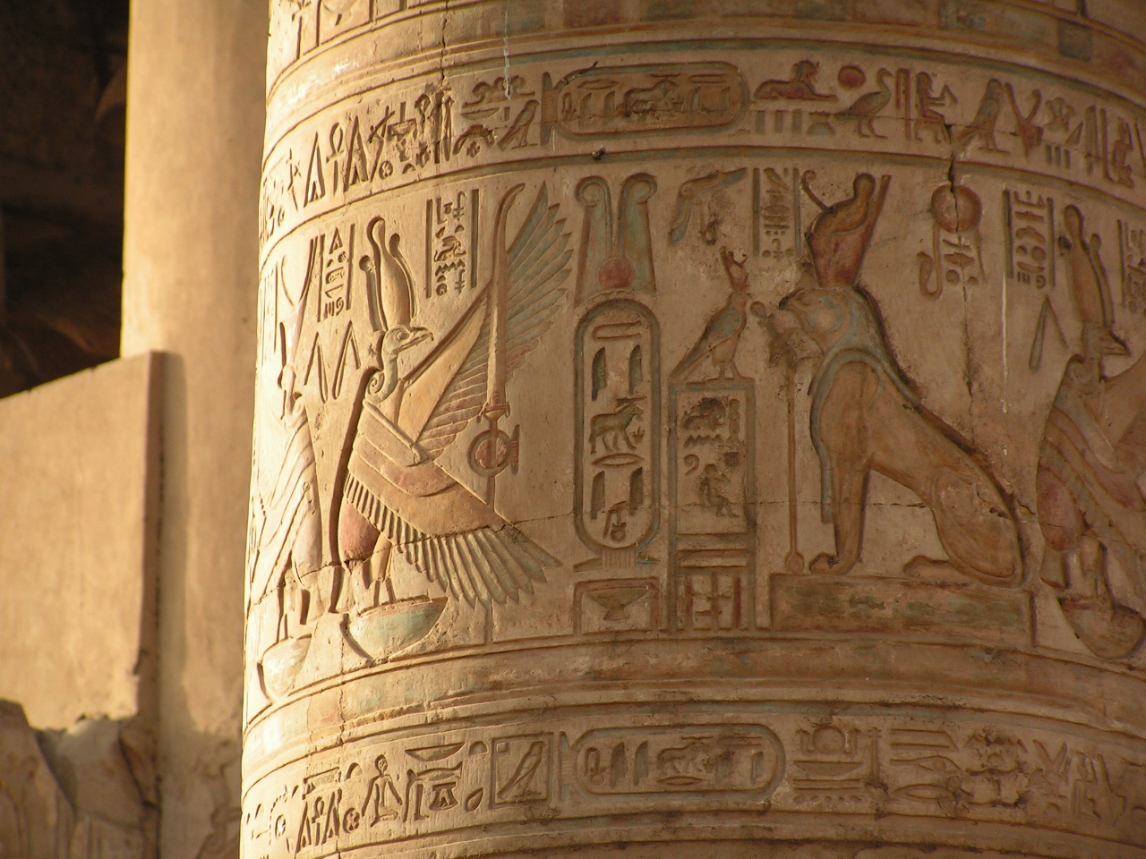 Pilier dans le temple de kom Ombo. On peut voir la finesse des sculptures, et les couleurs d'origine. Tiberius.